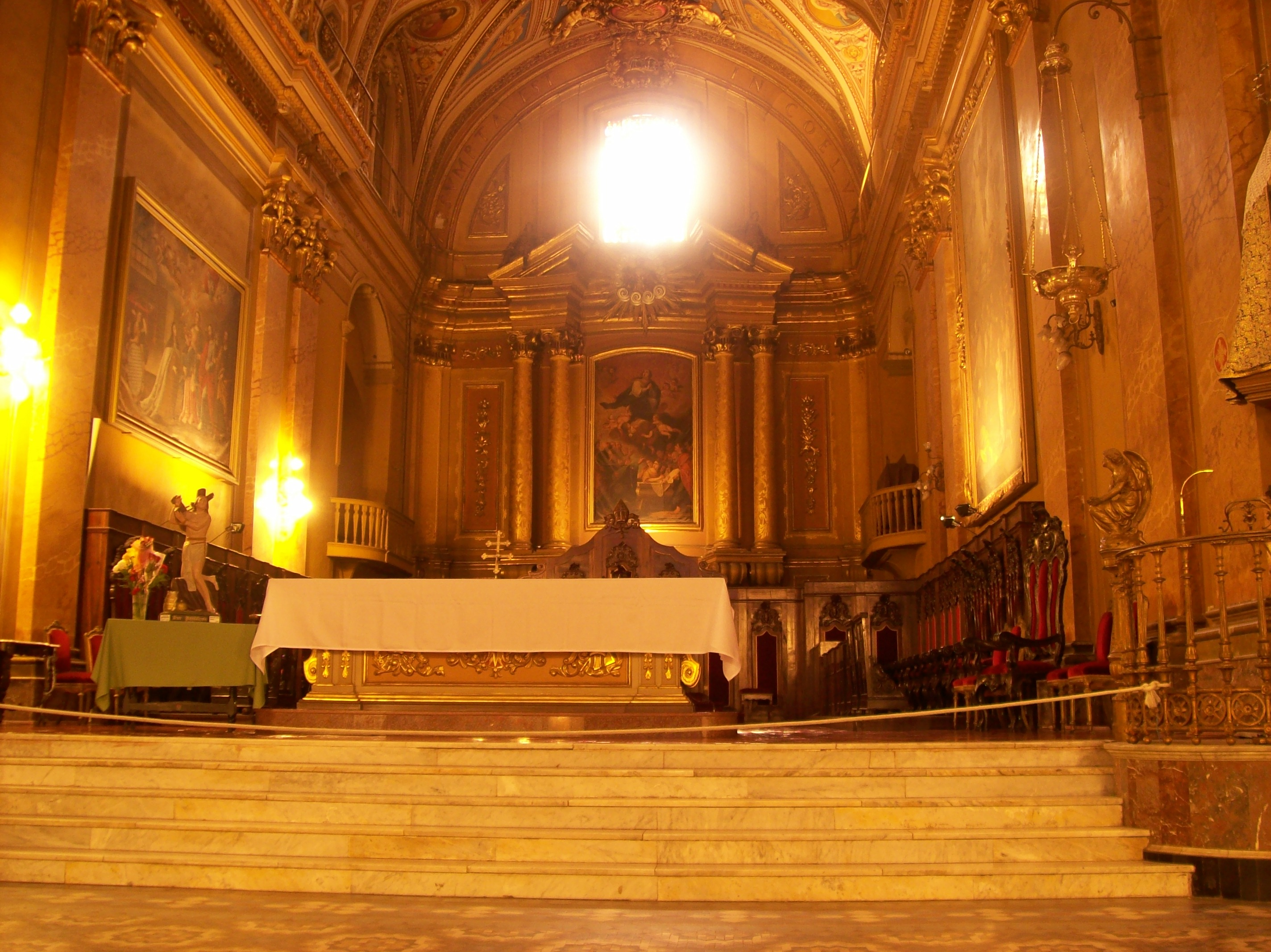 Altar mayor de la Catedral de Córdoba, en la provincia de Córdoba, Argentina.